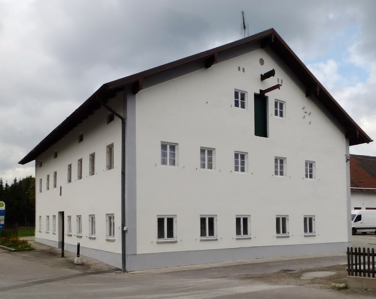 Alling Griesstr.1, ehemalige Gast- und Tafernwirtschaft, Ansicht von SüdenThis is a photograph of an architectural monument.